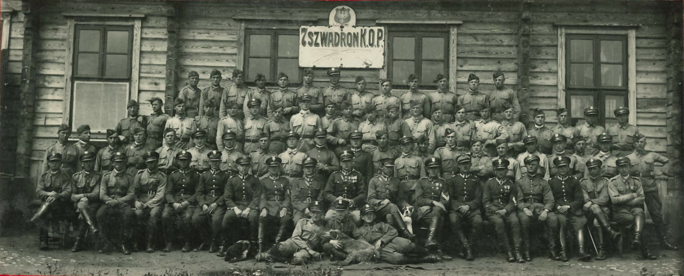 7 szwadron KOP